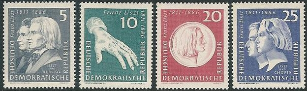 F. Liszt (timbres RDA / Briefmarken DDR)